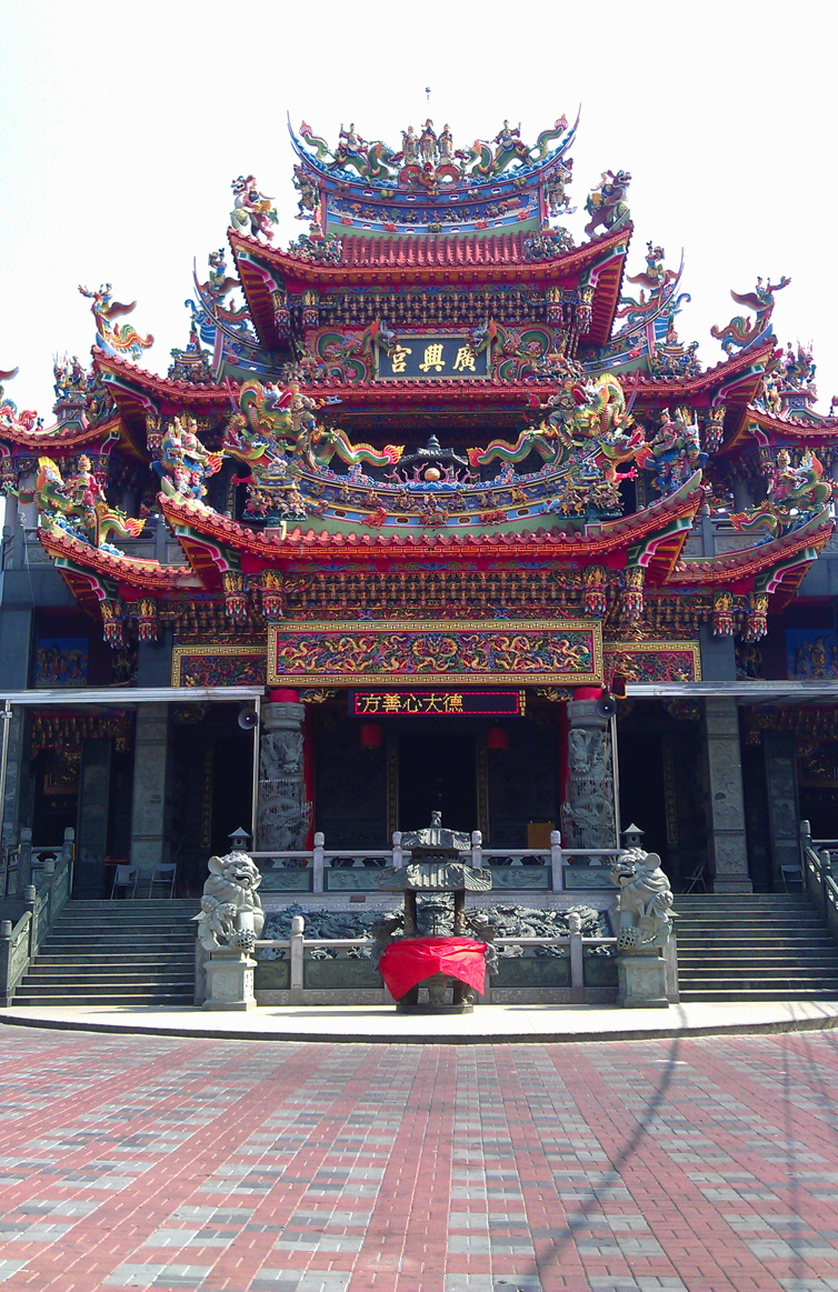 中文（台灣）: 太平廣興宮